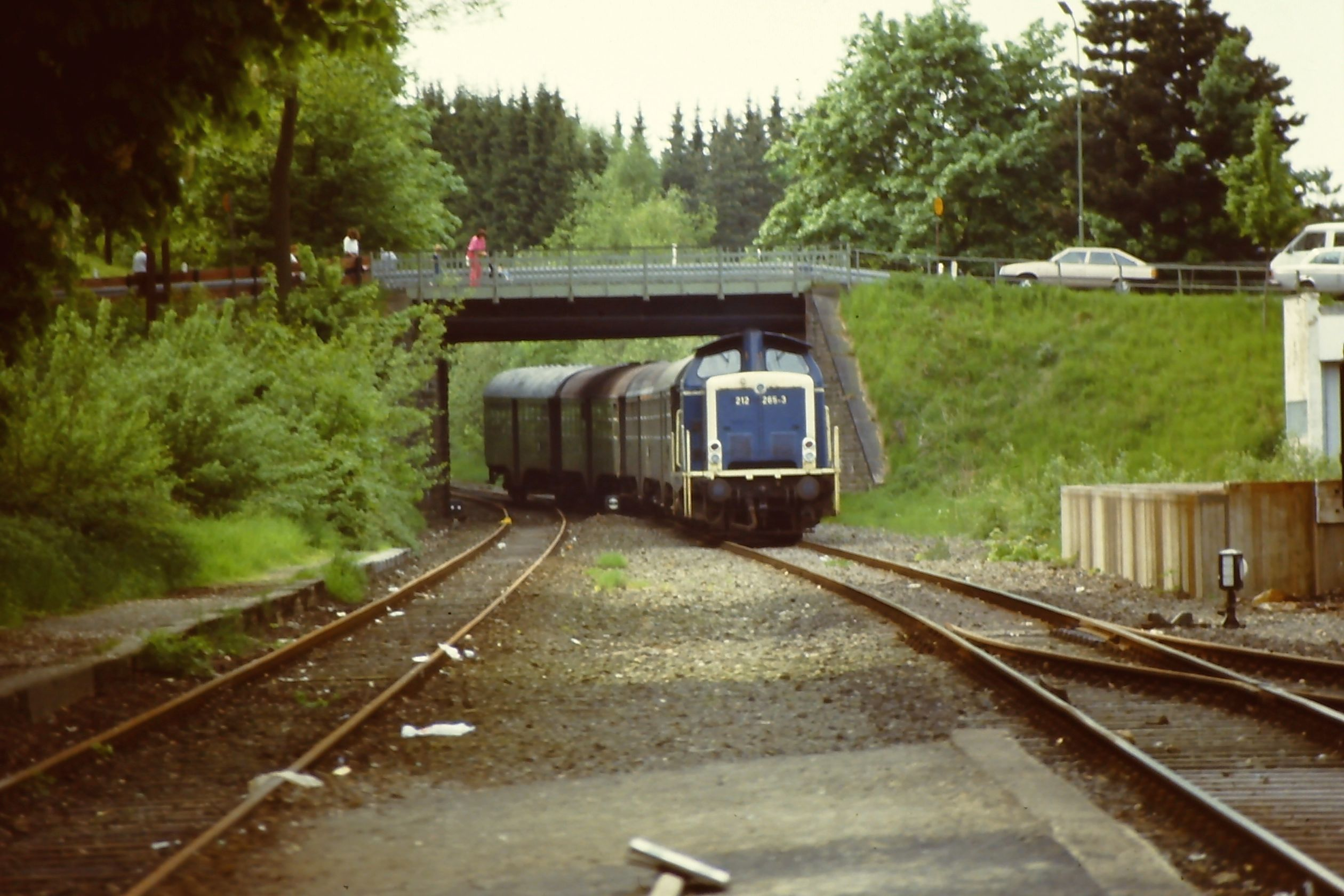 212 265-3 mit N 6073 in Hückeswagen